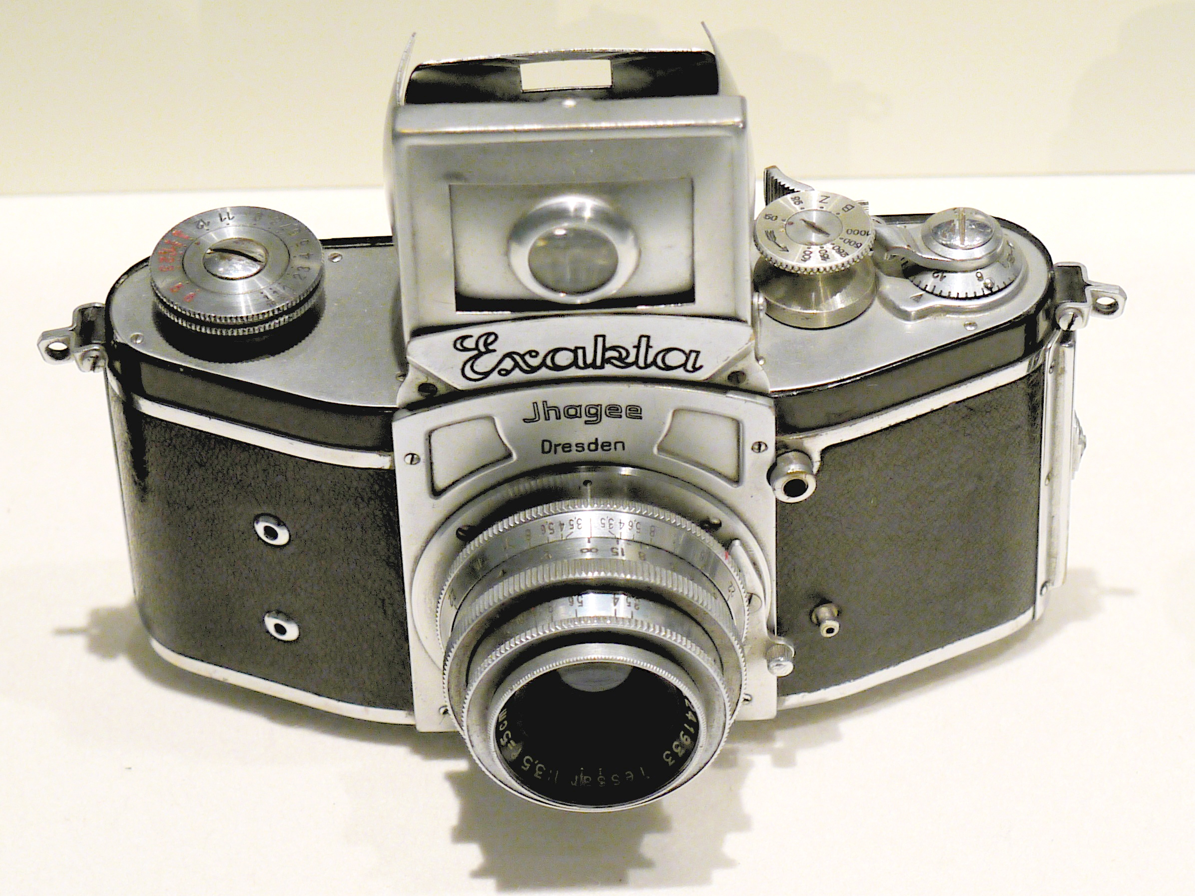 Kine Exakta 1 aus dem Jahr 1936, die erste serienmäßig hergestellte 35 mm Spiegelreflex-Systemkamera der Welt, Technisches Museum, Berlin